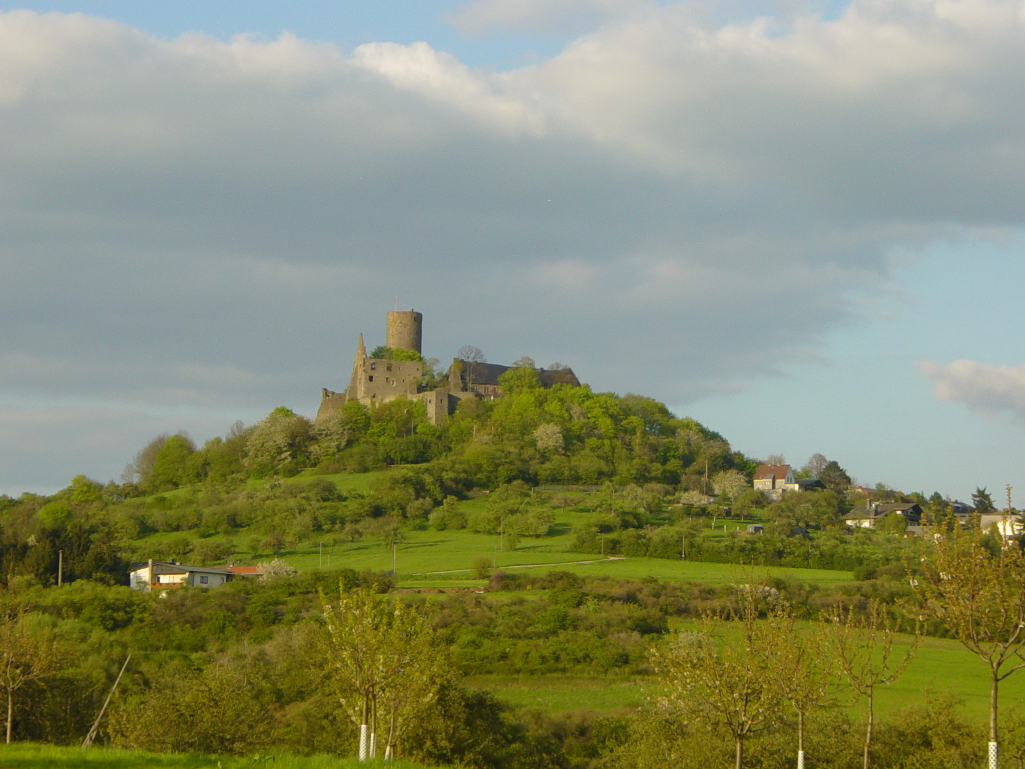 Gleiberg von Westen